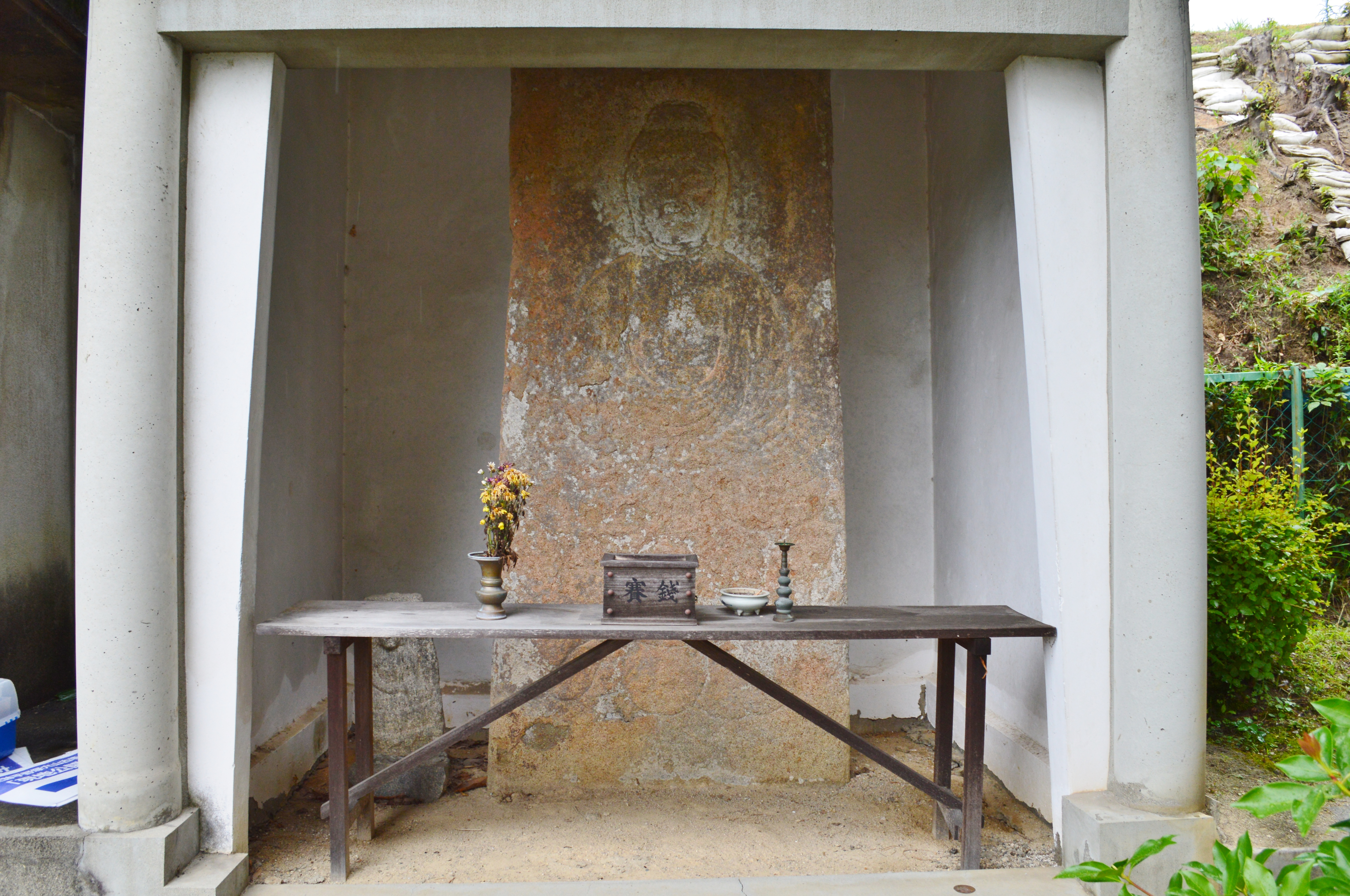 正楽寺 (香芝市) 石造線刻阿弥陀如来坐像